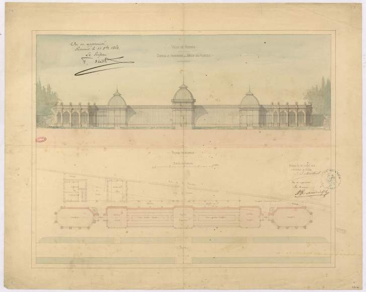 Serres et orangerie au jardin des plantes de Rennes. Plan de Martenot. Format réel 63x51.